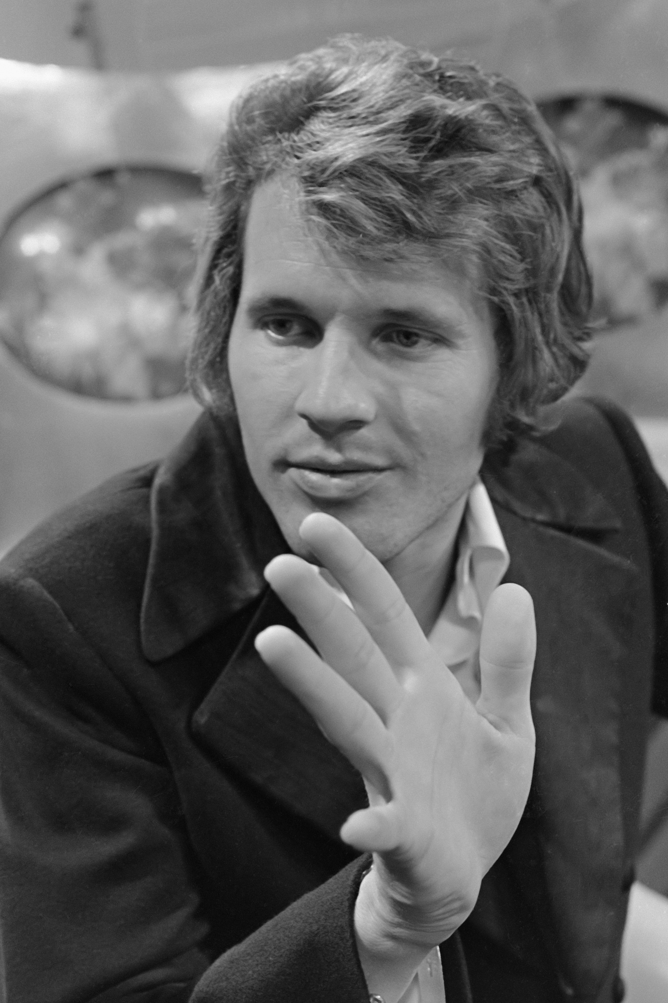 Fanclub TV van de Beatgroep "Flowerpot Men" zal optrede De Amerikaanse zanger John Walker 9 november 1967